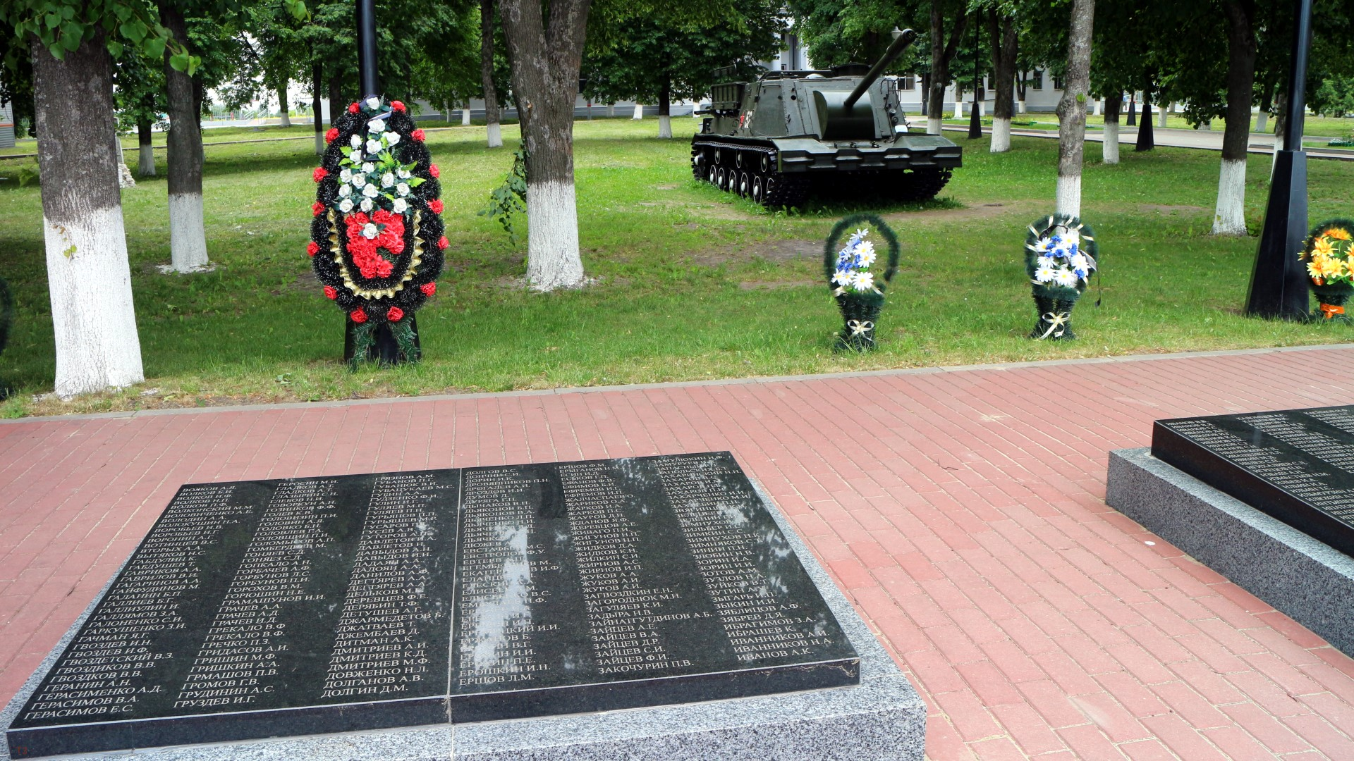 Село Поныри - часть комплекса с самоходкой, посвященного ВОВ. 2018г.